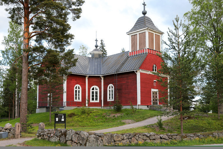 Pukkilan kirkko toukokuussa 2015